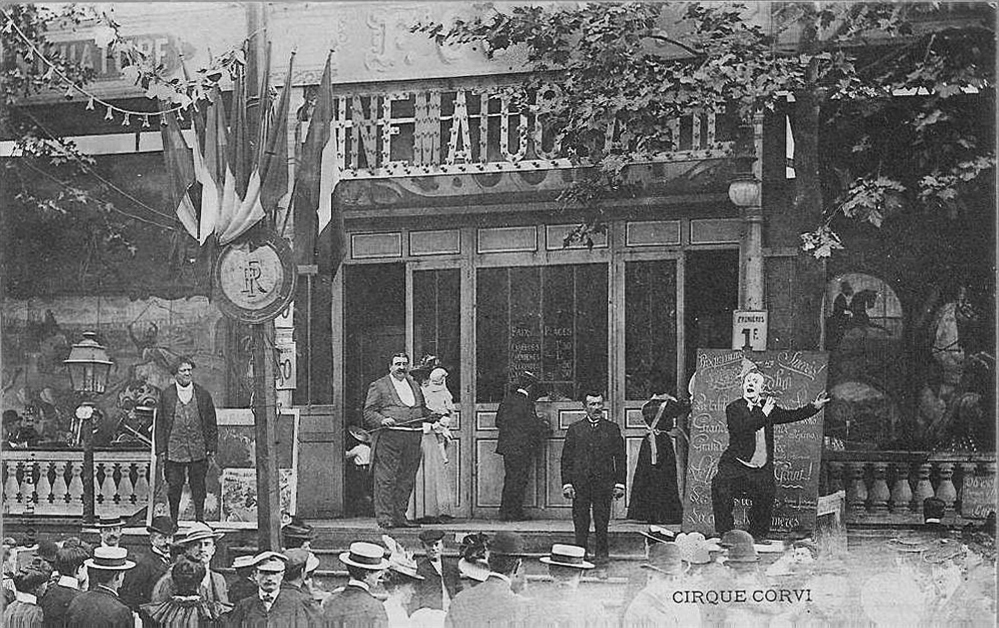 Fête de Neuilly-sur-Seine, Le Cirque Corvi, postcard c. 1900